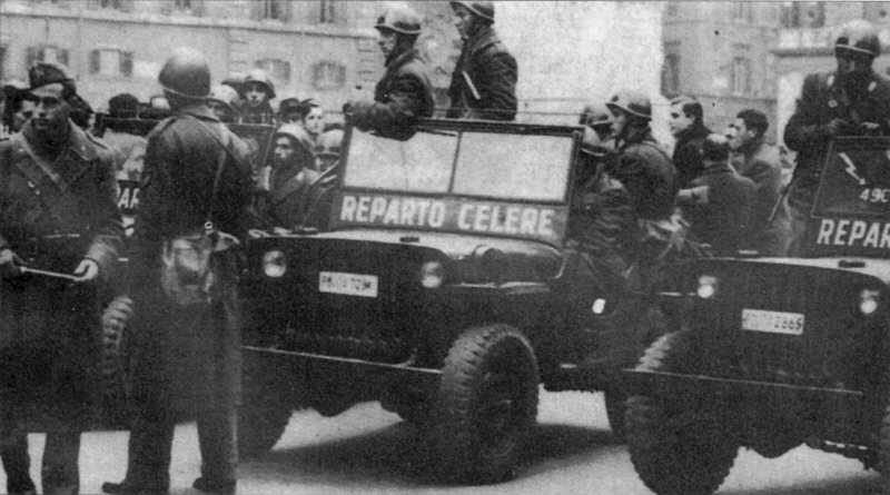 Italia anni '50: Jeep e poliziotti del reparto Celere.